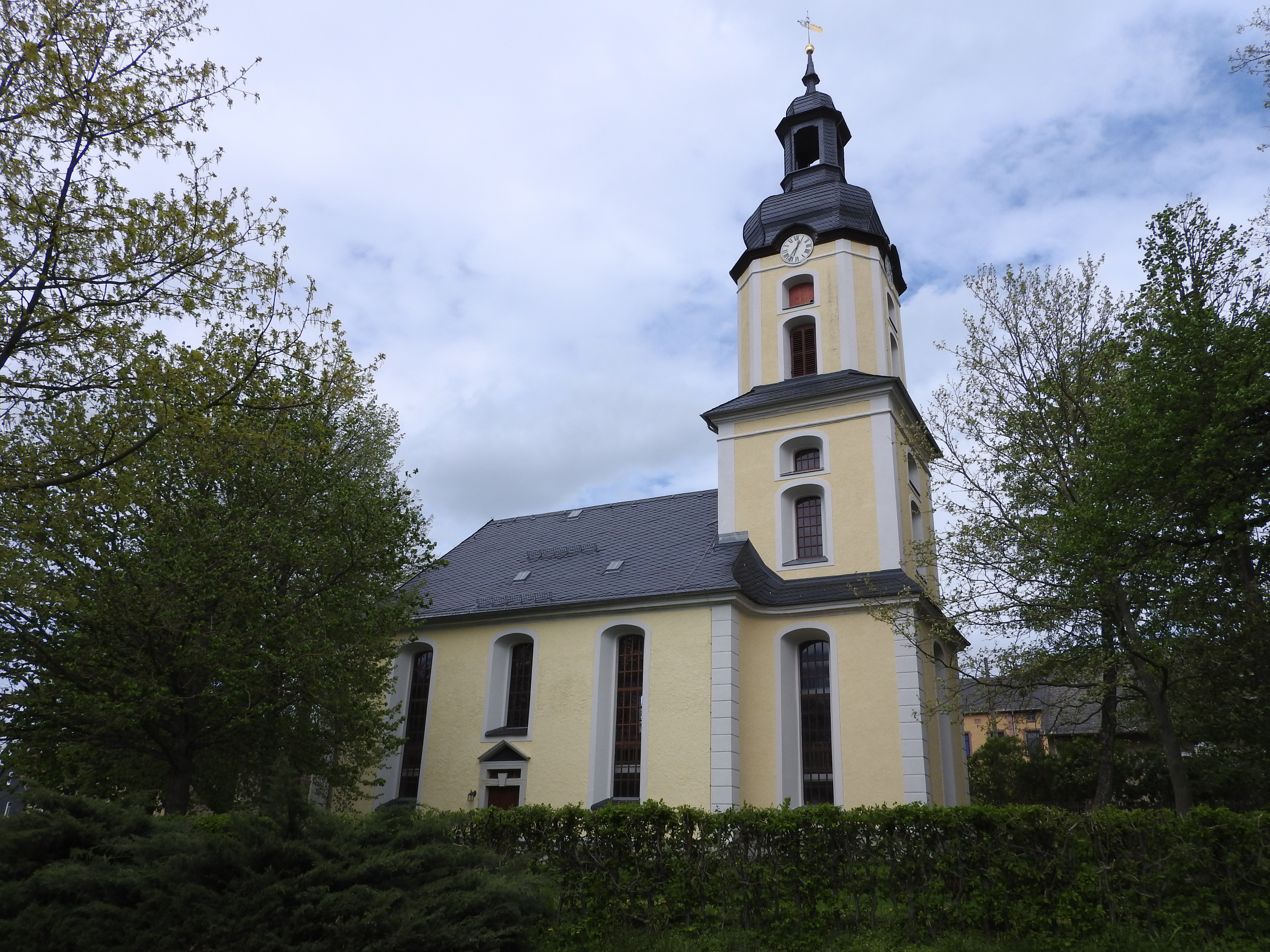 Kirche in Muntscha, Thüringen